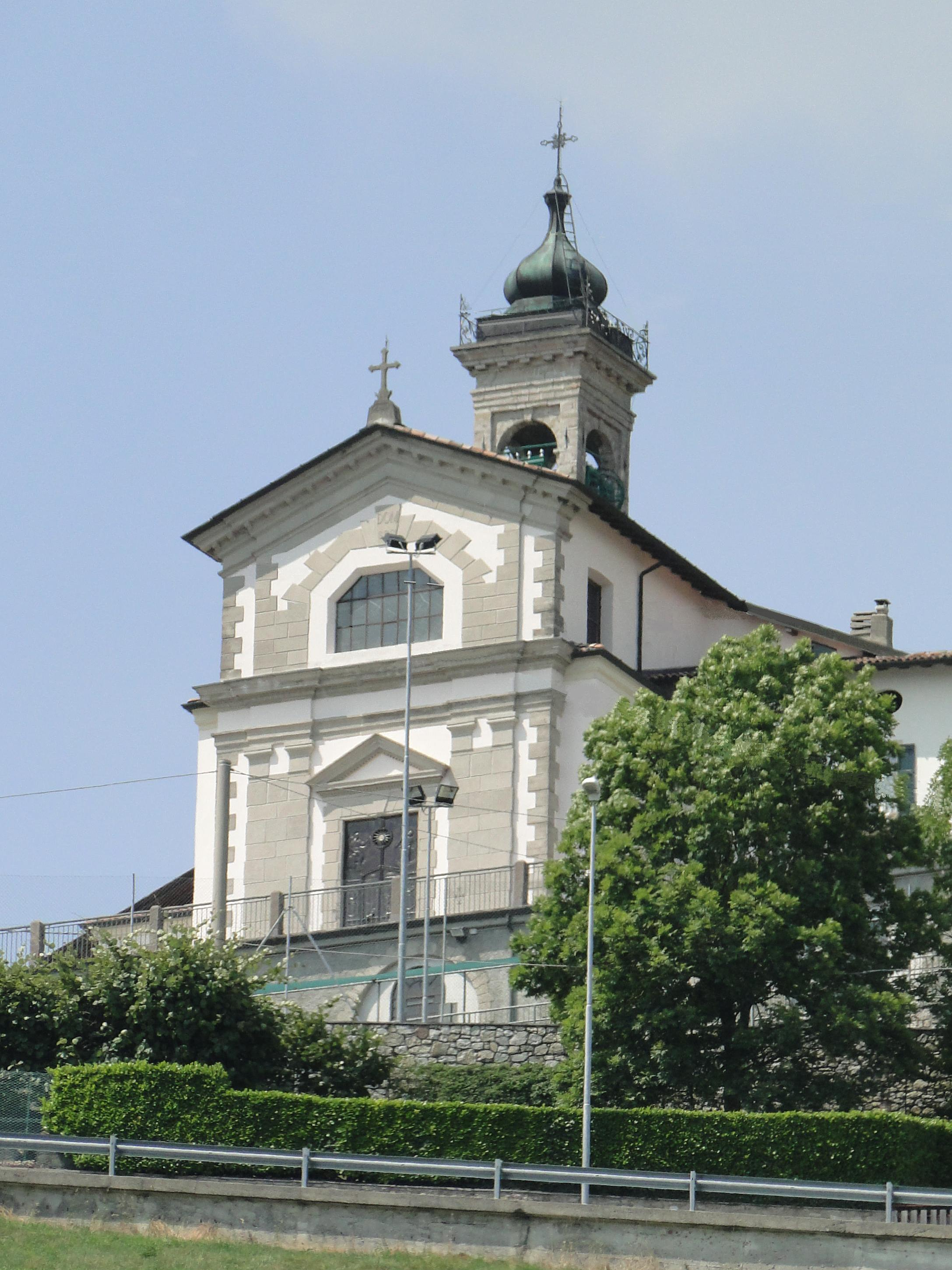 Amora, fraz. di Aviatico (BG). Chiesa di san Bernardino